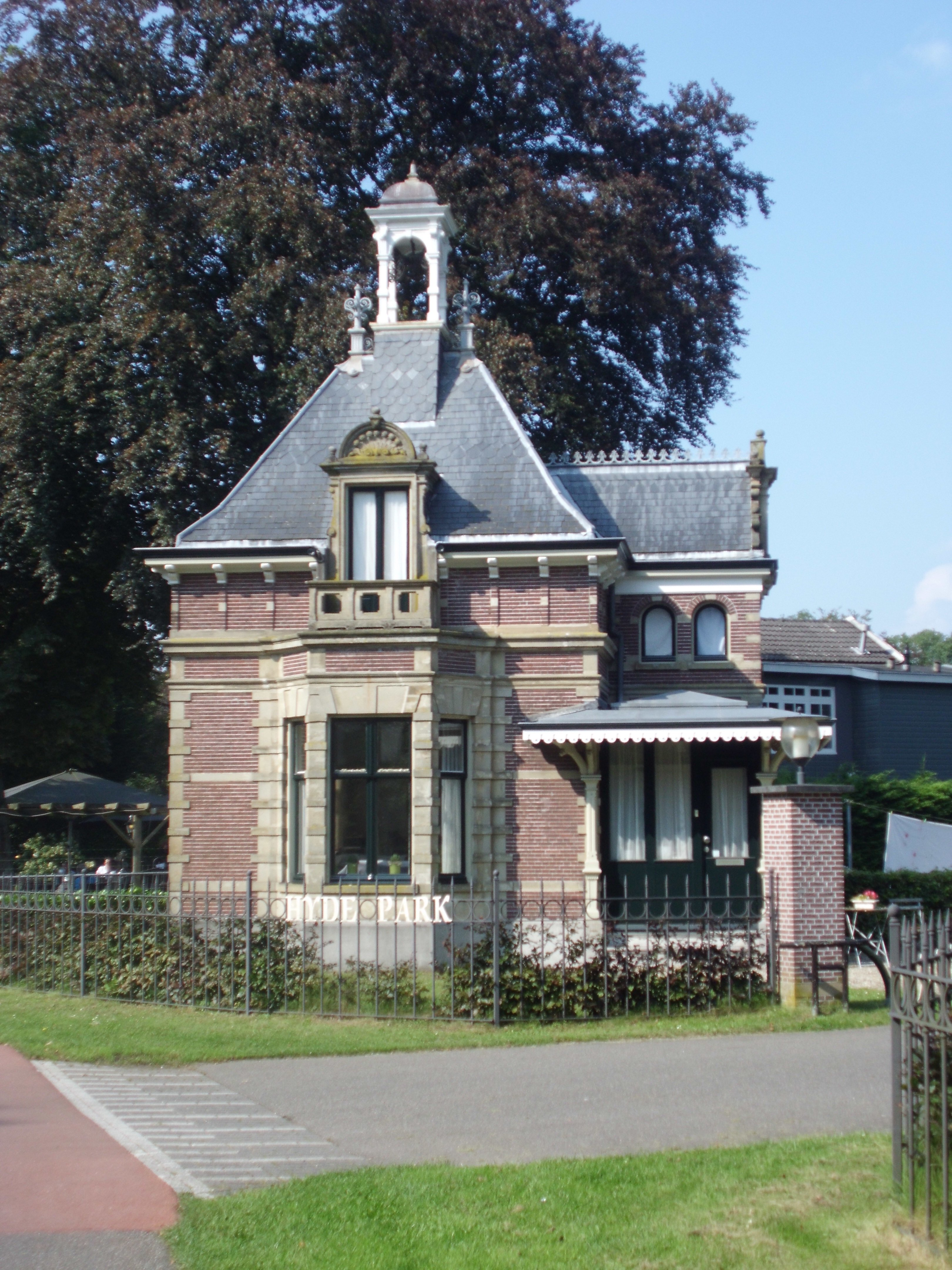 Hyde park portierswoning Doorn